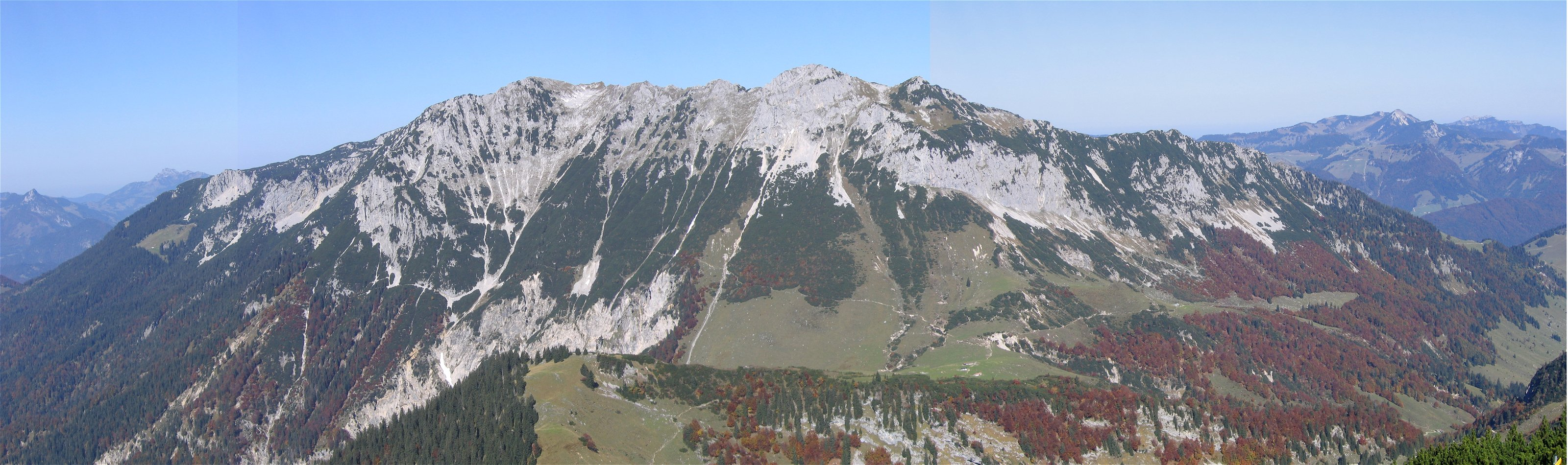 Zahmer Kaiser vom Stripsenkopf aus gesehen